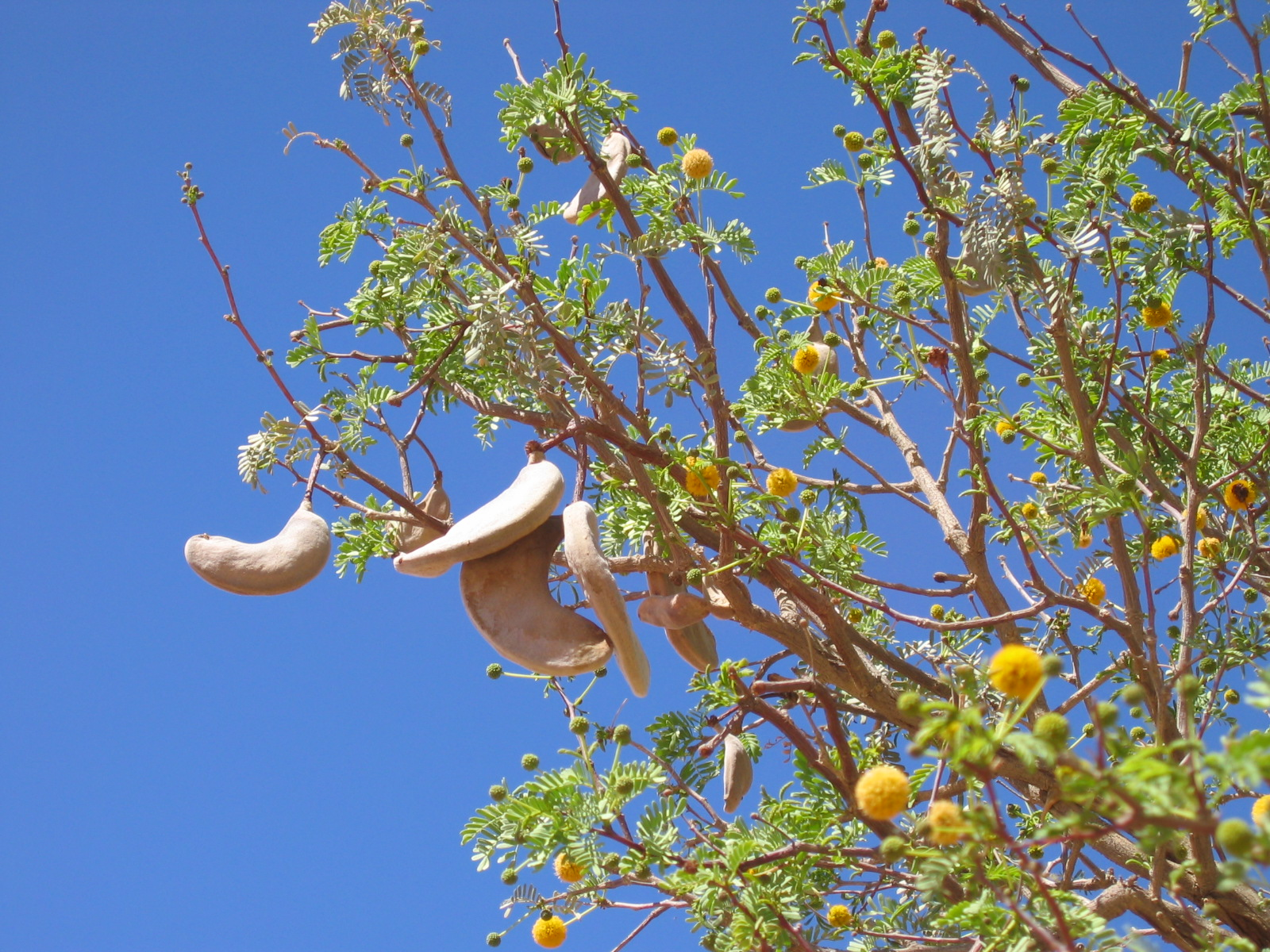 Kameldornbaum, Blüten und Samen, Sossusvlei, Namibia